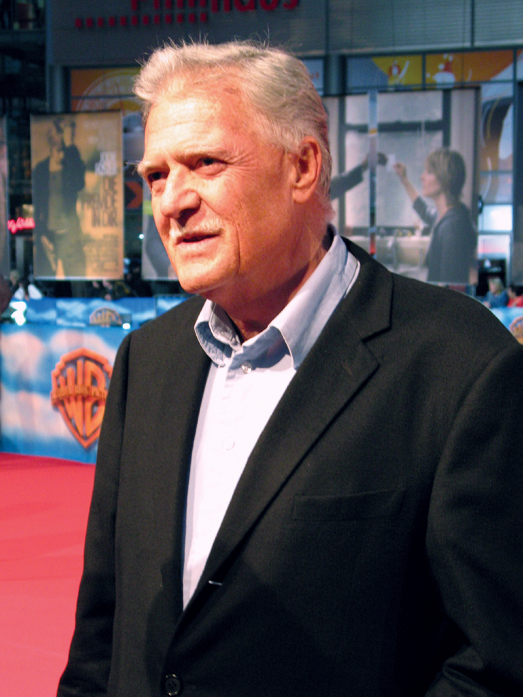 Michael Ballhaus bei der deutschen Filmpremiere The Brave One, Berlin, 13.9.2007